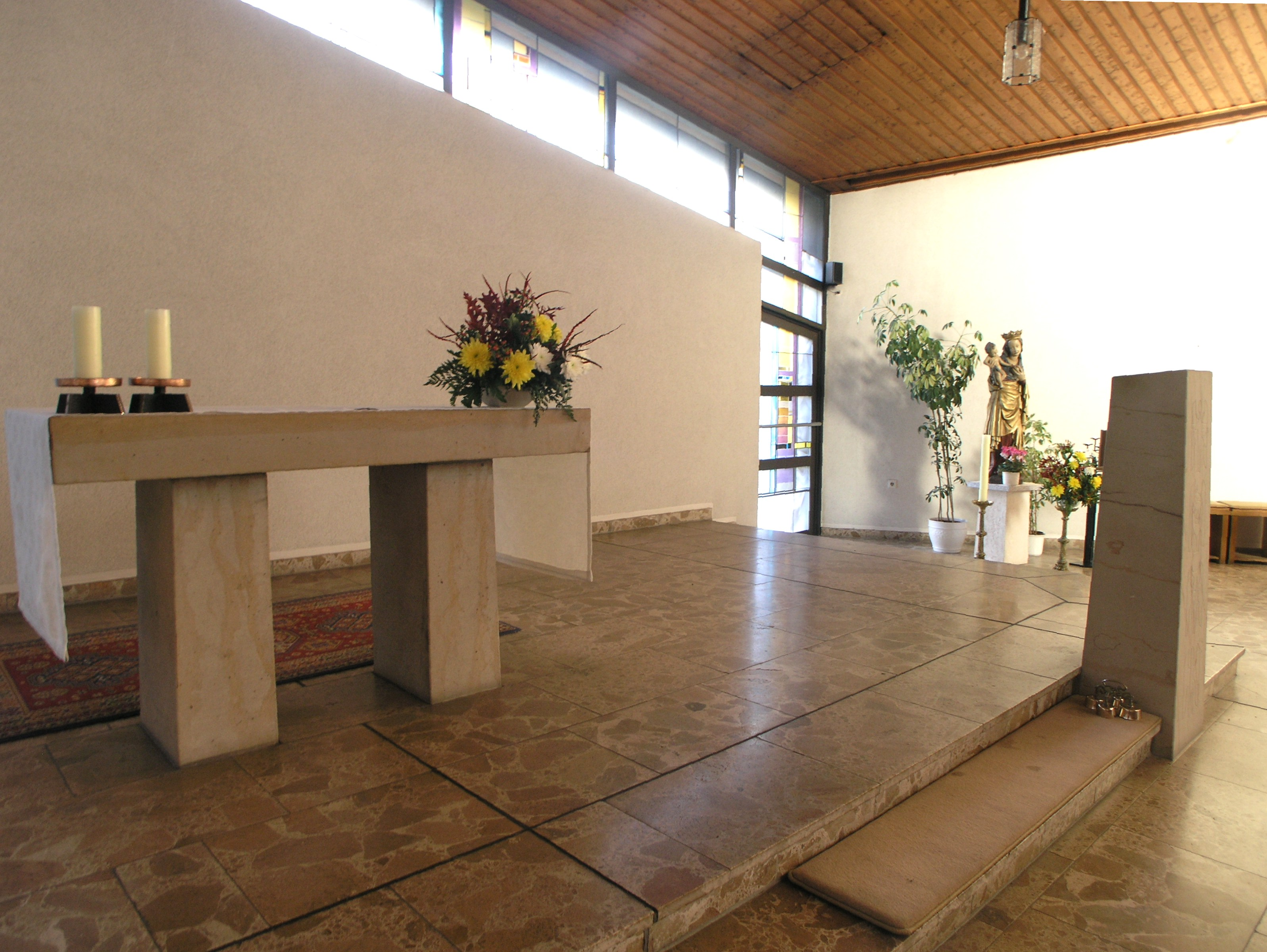 Der Altarbereich der Kirche Zum Guten Hirten